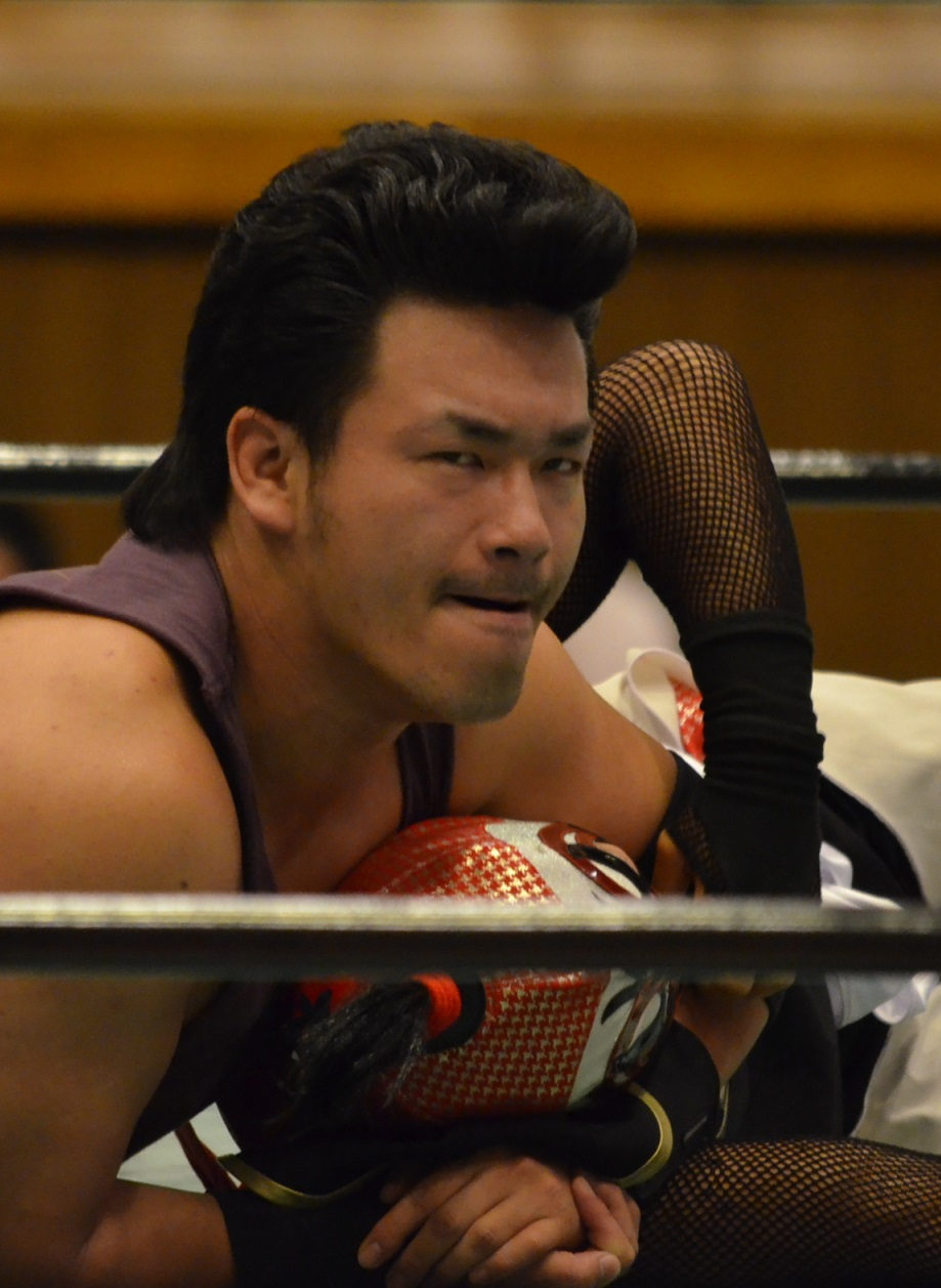 南野 タケシ